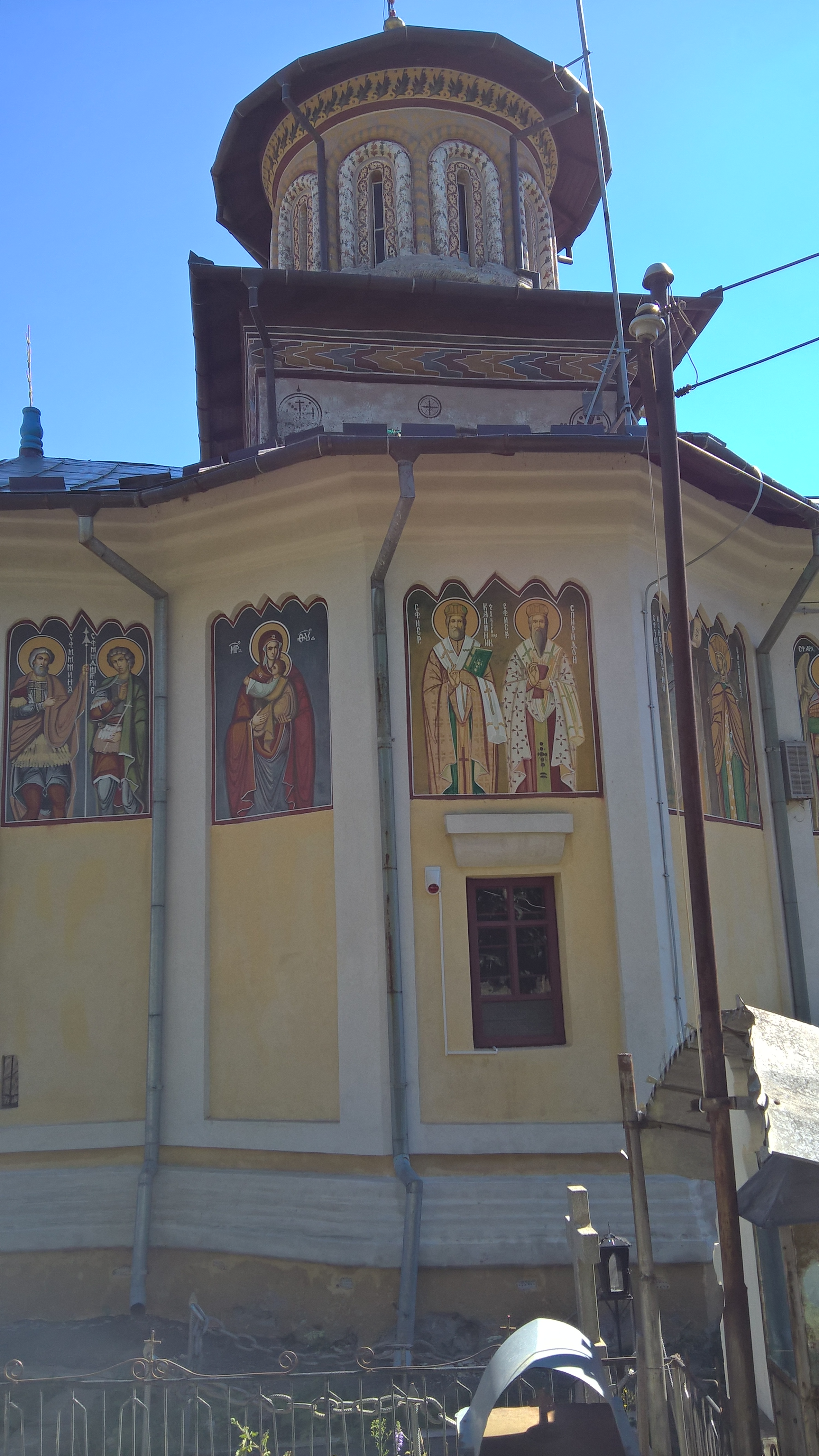 Biserica „Buna Vestire” și „Sf. Nicolae” - sat Scăueni; comuna Berislăvești Str. Principală 70 01